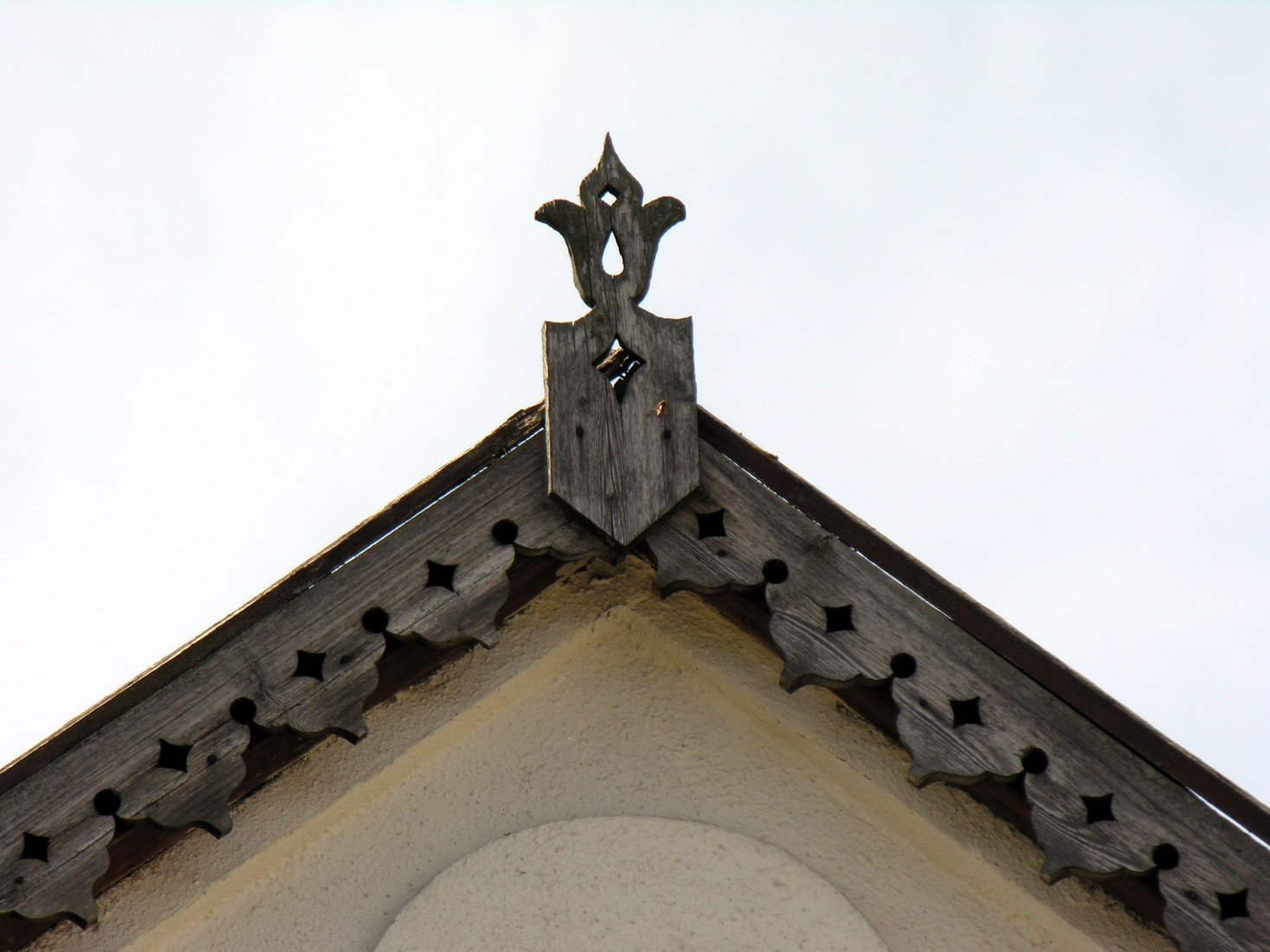 Lėkiai 2007 m. gegužės 6 d., Lietuva